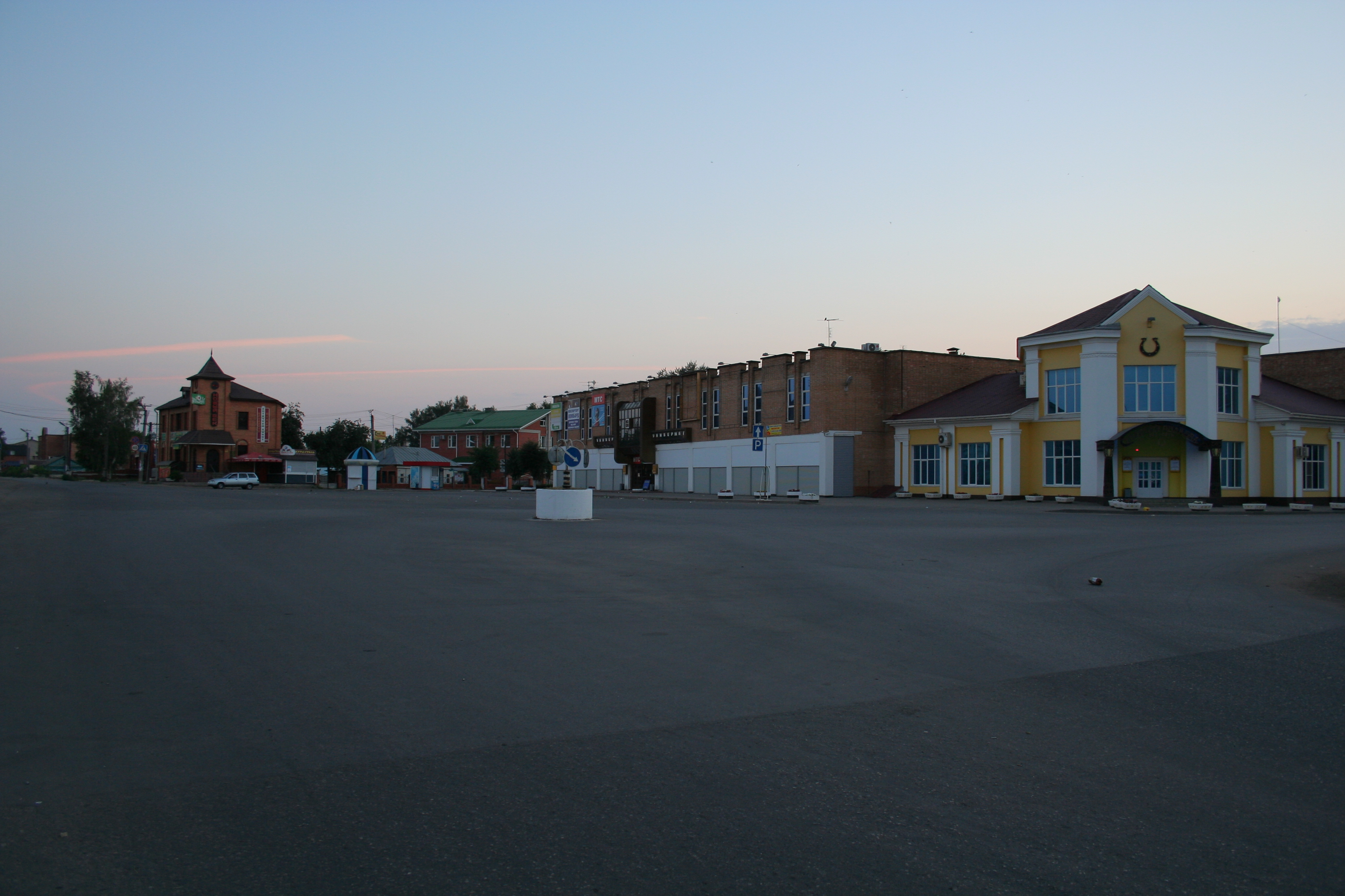 Stadt Rybnoje (Oblast Rjasan, Russland). Der Bahnhofsvorplatz.